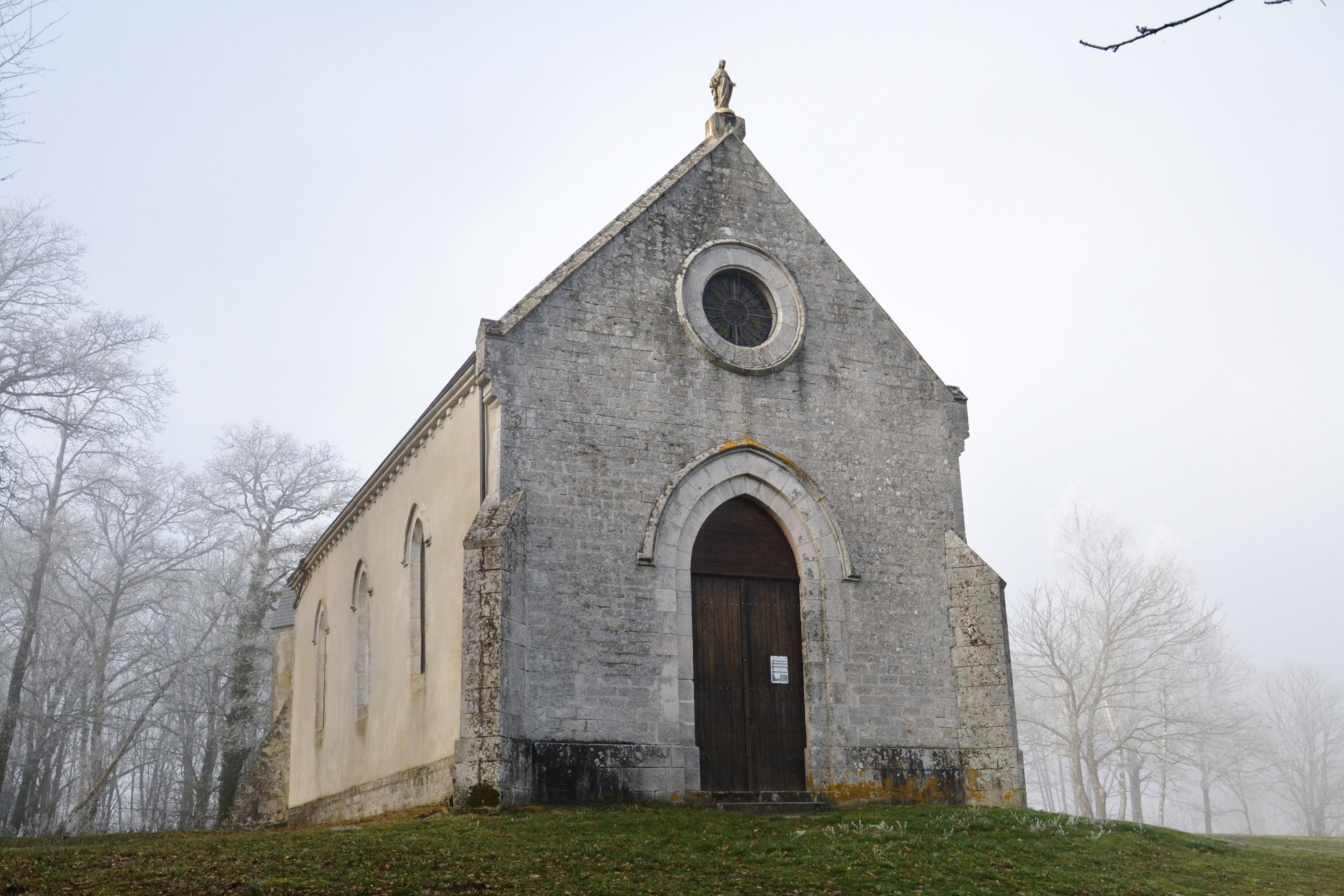 La chapelle de Vaulry (Haute-Vienne, France)